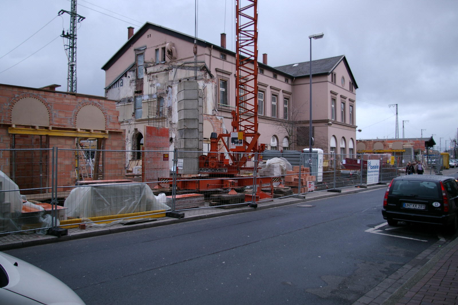 Unna, Bahnhofsumbau 2007